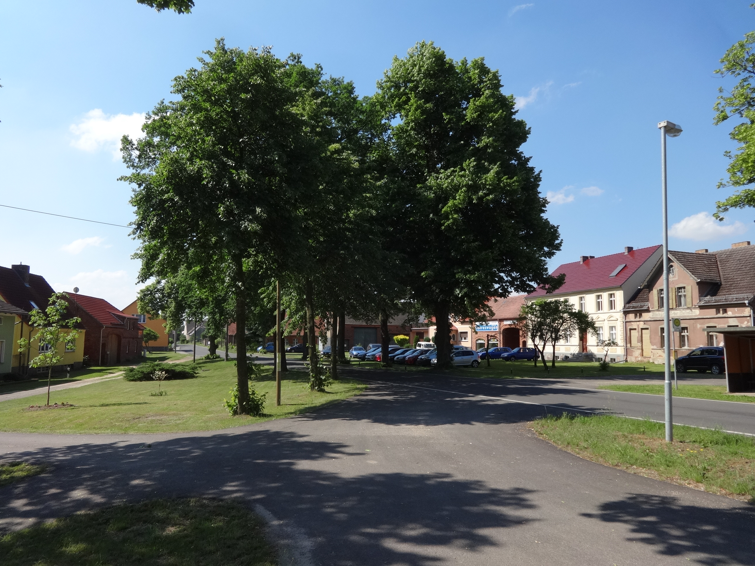 Dorfanger von Buckow, ein Ortsteil der Stadt Dahme/Mark in Brandenburg